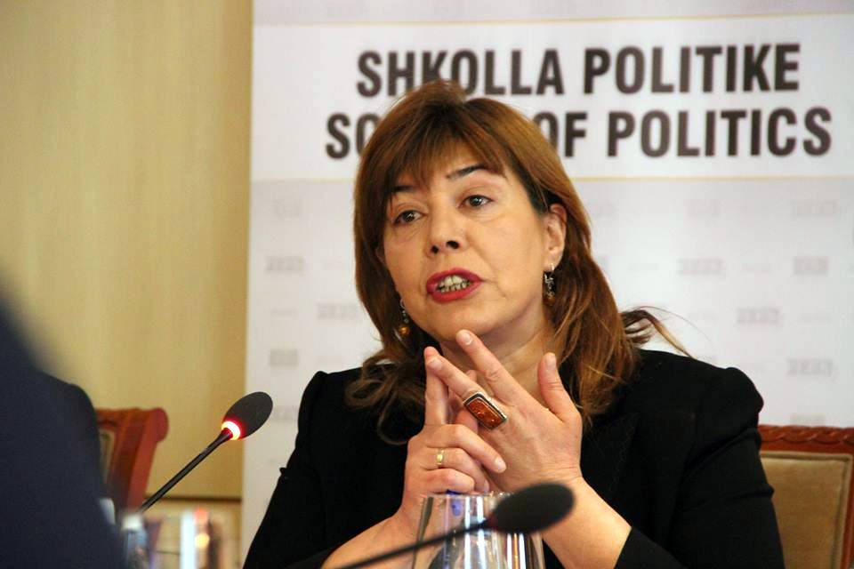 Gjuljeta Mushkolaj